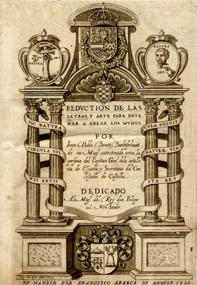 Portada de Reducción de las letras y arte para enseñar a hablar los mudos, Biblioteca Nacional de España, de Juan Pablo Bonet